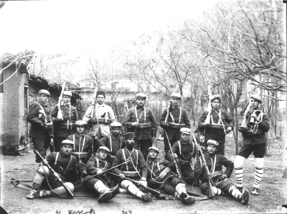 Cheta of IMARO voivoida N. B'akov, 1907